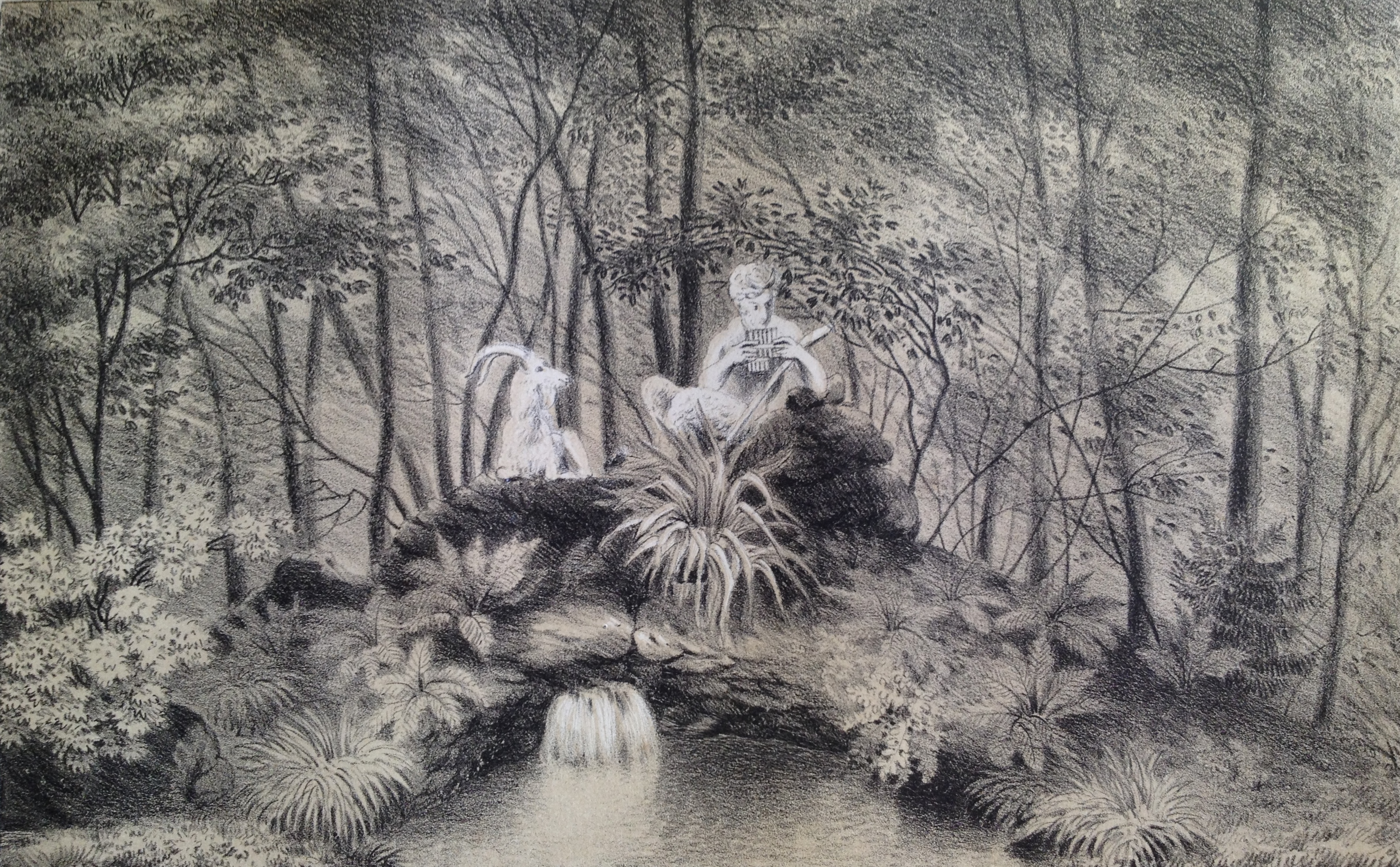 Die Gruppe des Pan im Schlosspark Nymphenburg wurde bereits kurz nach ihrer Aufstellung im Jahre 1815 lithographisch vervielfältigt.